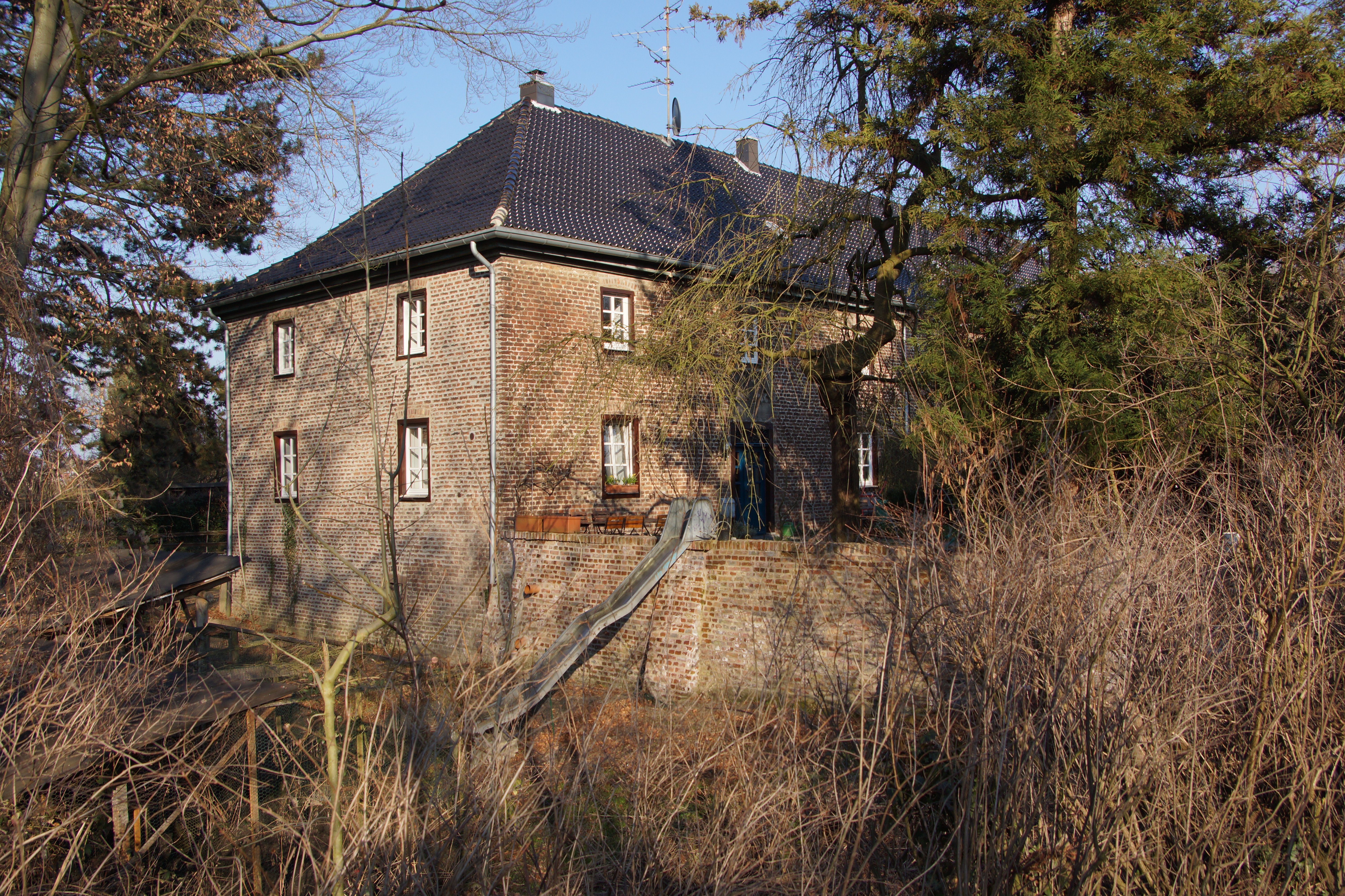 Burg Bachem, Vorburg, in Frechen-Bachem